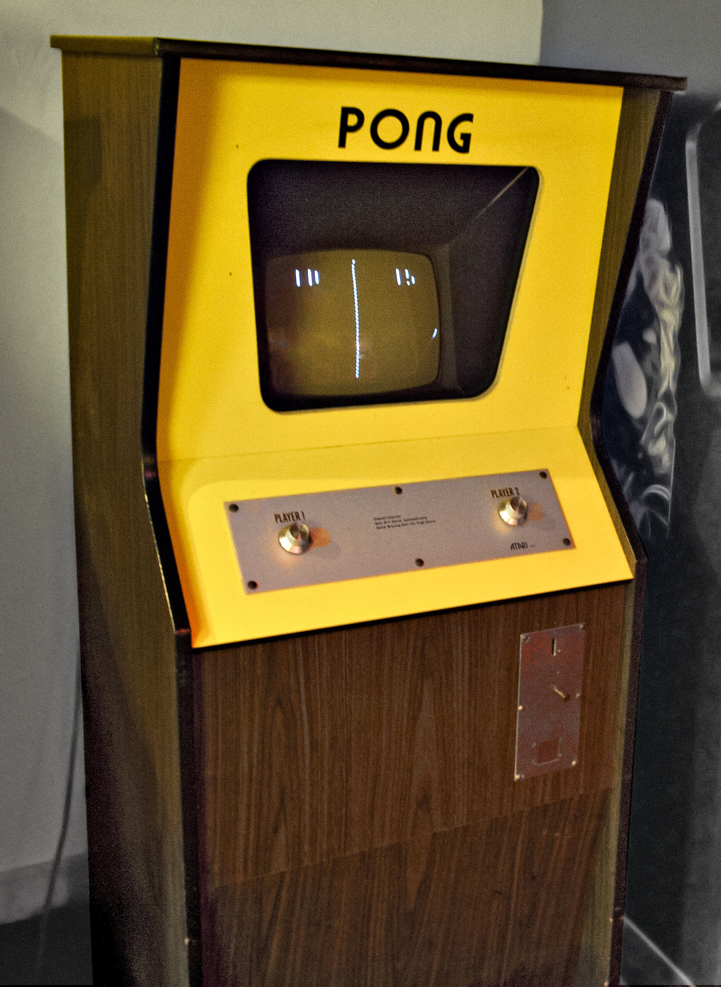 Atari Pong cabinet